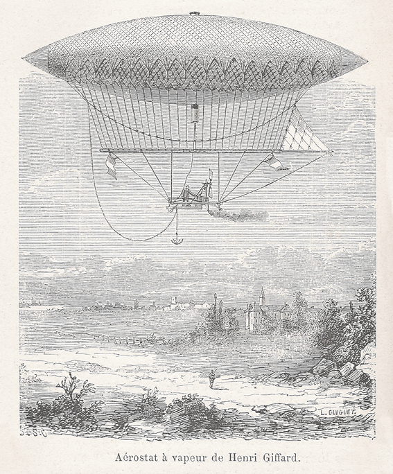 « Aérostat à vapeur de Henri Giffard. » Illustration tirée de Louis Figuier, Les aérostats, Jouvet & Cie, Paris, 1887